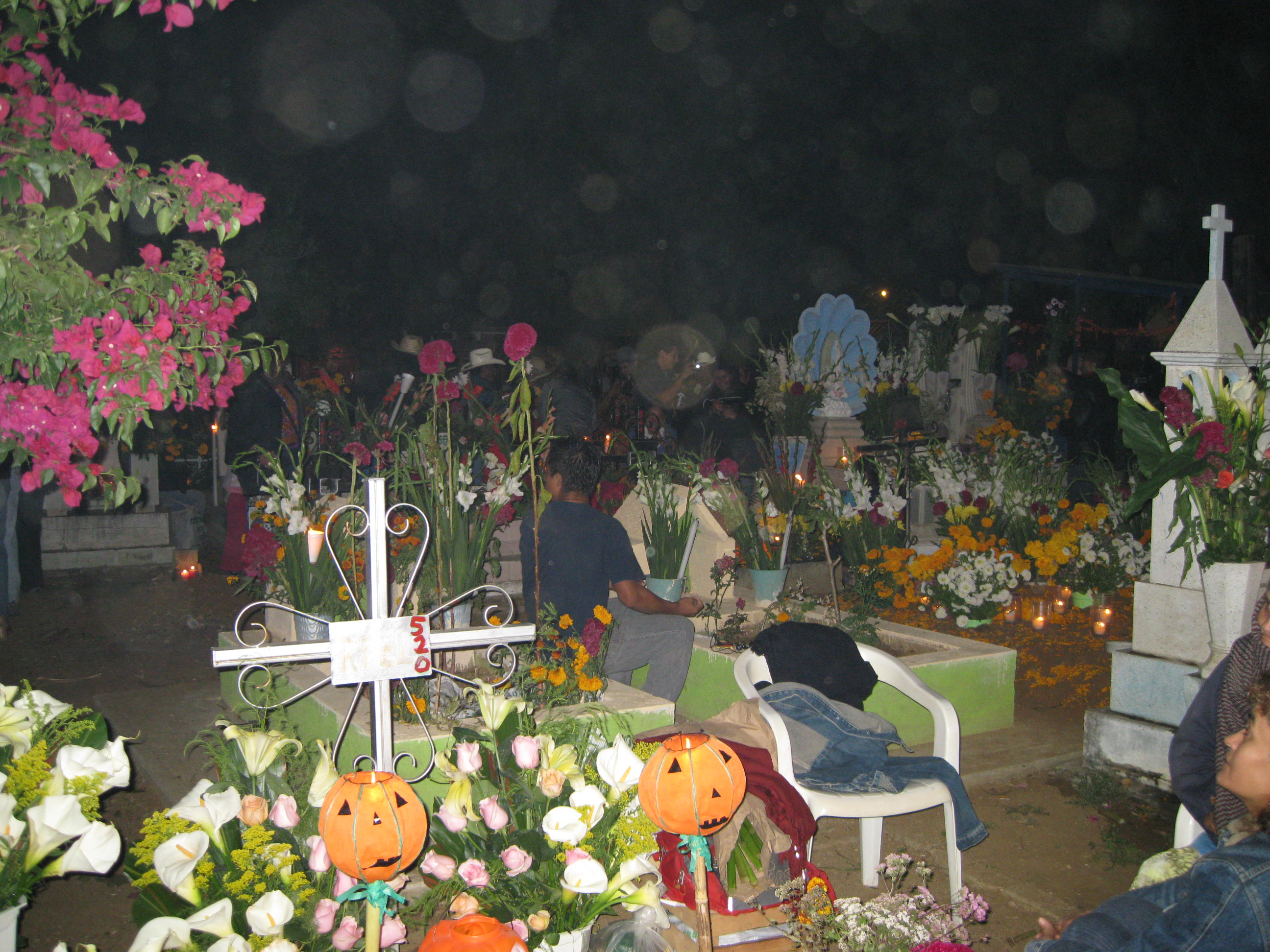 Panteon de xoxo Mexico